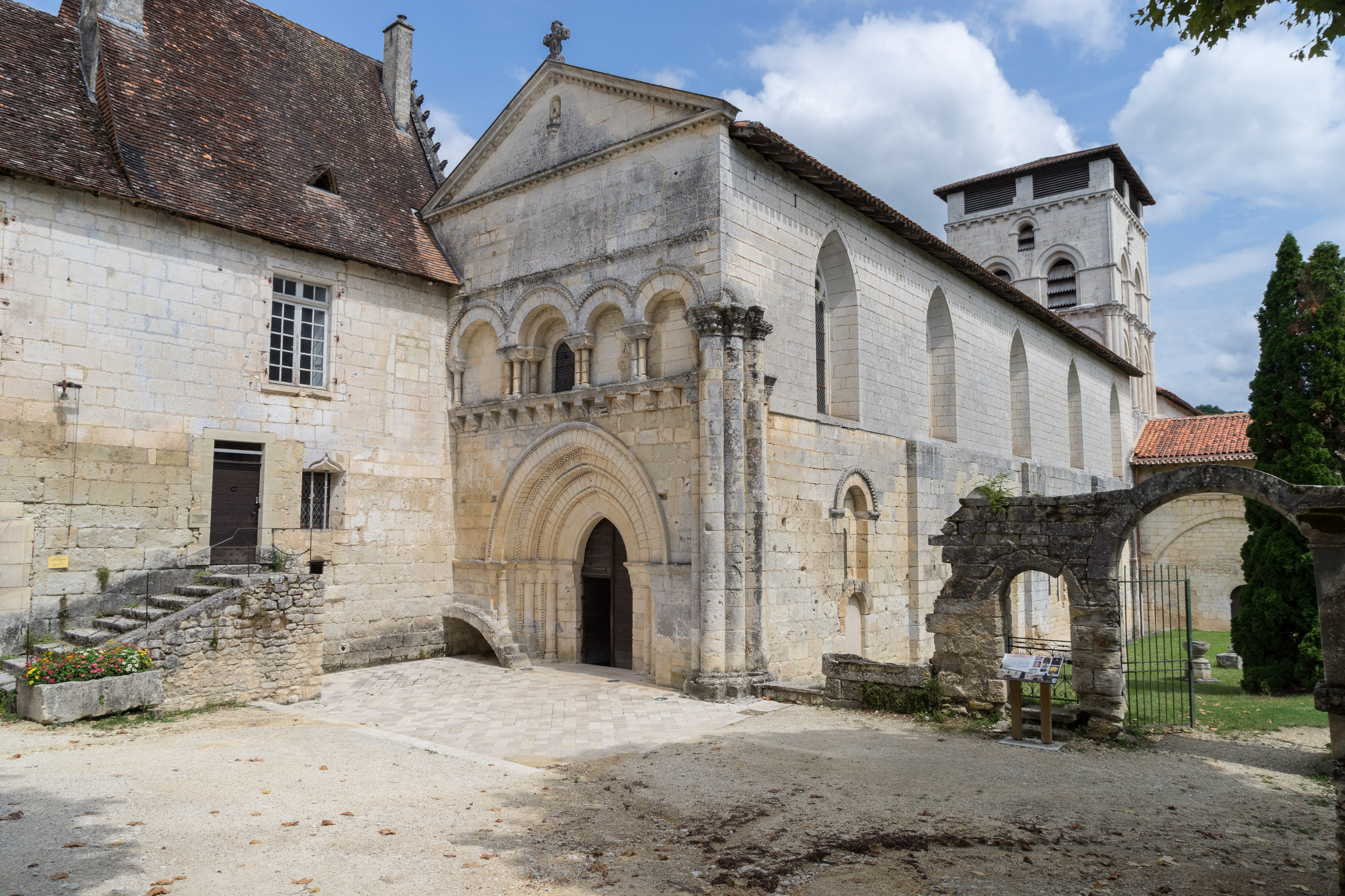 Abbaye de Chancelade